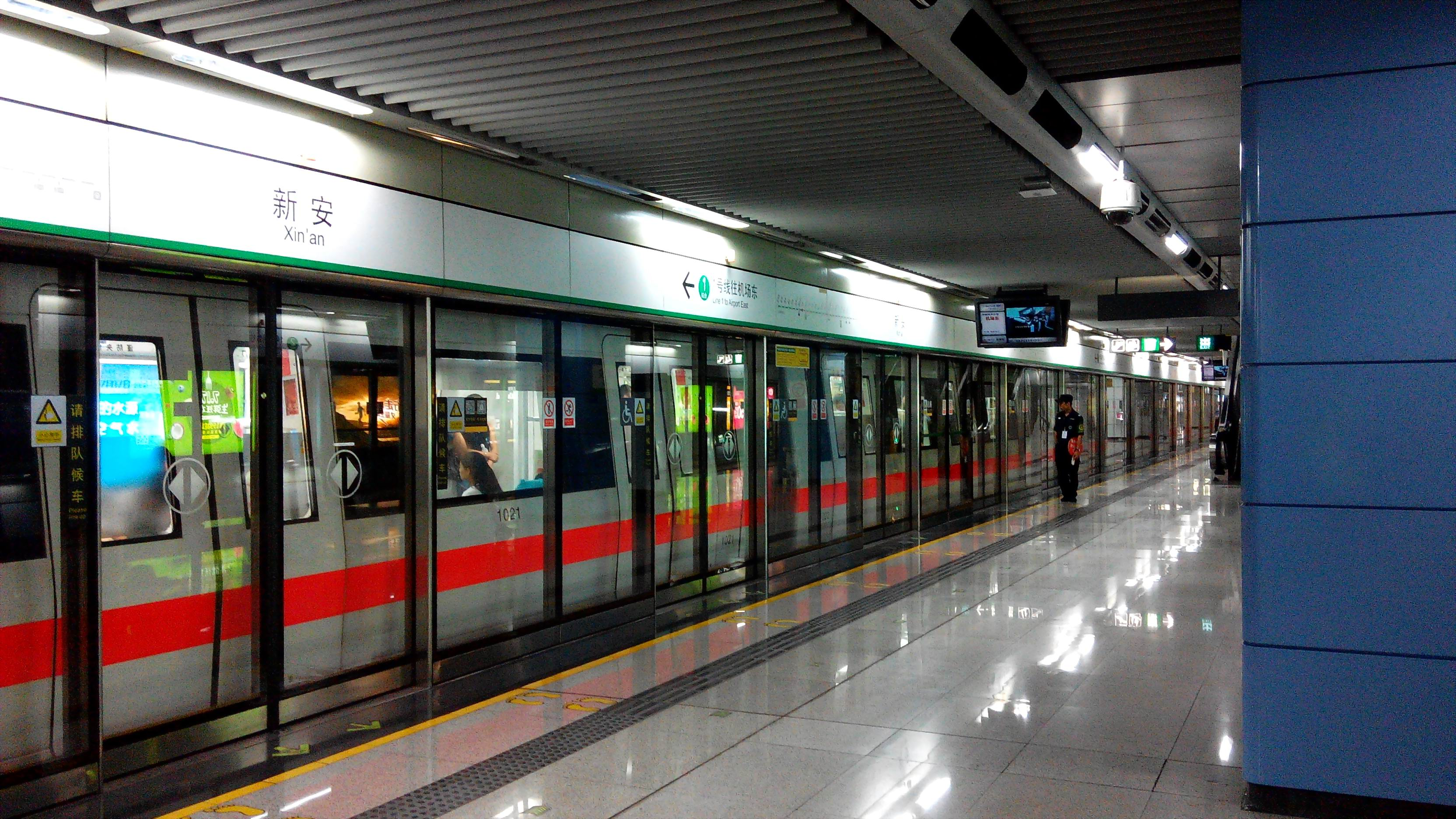 深圳地铁1号线 新安站 站台